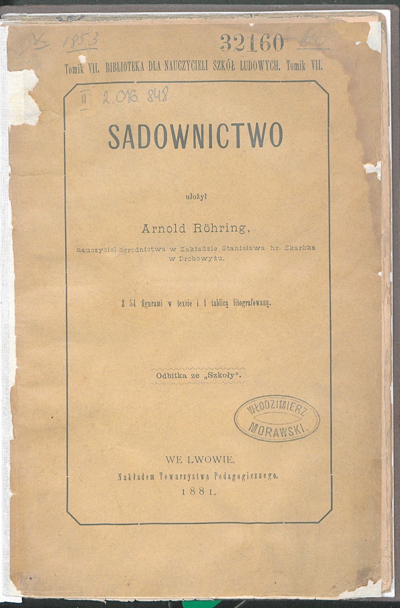 Підручник «Садівництво» (Arnold Röhring; «Sadownictwo»; Lwów: Towarzystwo Pedagogiczne, 1881; 124 стор., 54 мал., 1 літографічна таблиця)